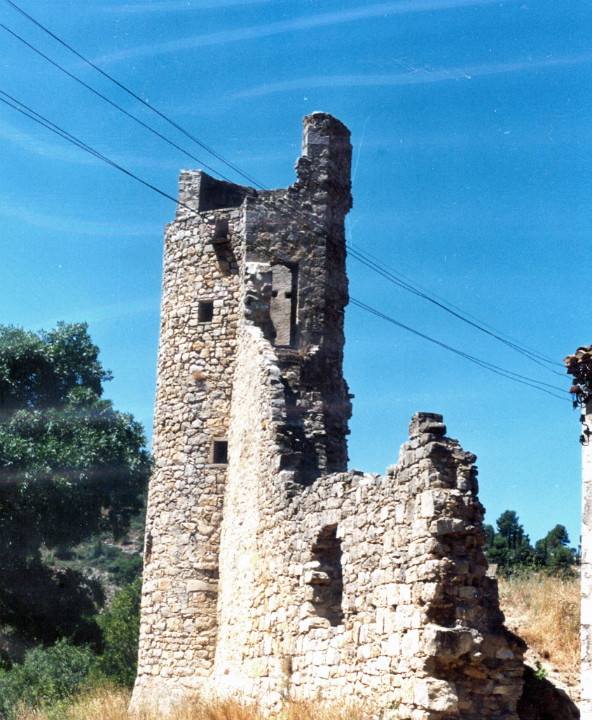 Durban